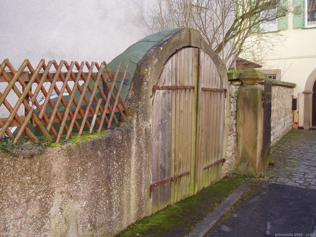 Historischer Kellerhals in der Kirchgasse in Heilbronn-Horkheim